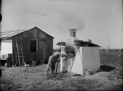 אפית לחם בכפר גדעון בעמק יזרעאל